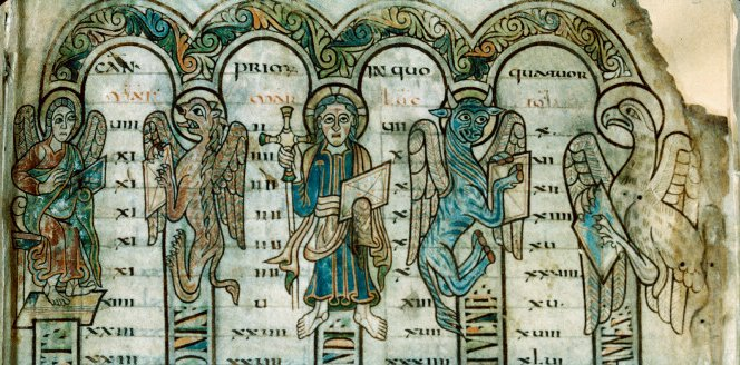 F° 8. Origine: Est de la France. Lieu de conservation: Autun, BM, ms 4.